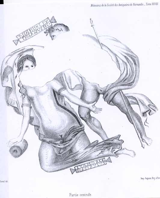 détail mosaique de lillebonne